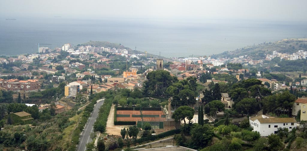 Vista general de Tiana